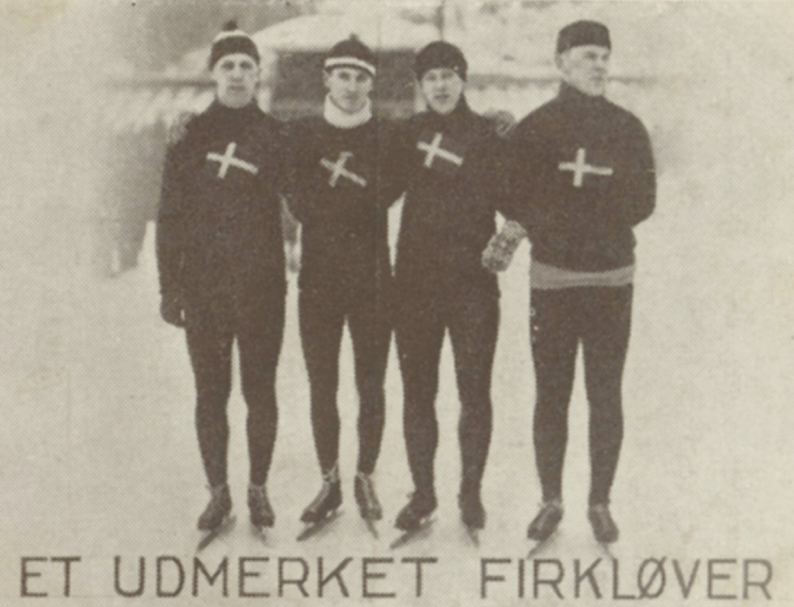 Format: Samlekort Dato / Date: ca. 1930 (dokumentet) Fotograf / Photographer: Ukjent Wikipedia: Erling Lindboe (1910 - 1973) Eier / Owner Institution: Trondheim byarkiv, The Municipal Archives of Trondheim Arkivreferanse / Archive reference: Sportsklubben Freidig: Sigarettfoto ca. 1930 (Løpenr. 75) F23921 Tekst på baksiden: Fotografiet viser de 4 norske skøiteløpere som overlegent vant juniorlandskampen på skøiter over Sverige. Fra venstre Thorbjørn Andresen, Sandefjord, Anders Johansen, Oslo, Ørnulf Daasnes, Oslo og Erling Lindboe, Trondhjem. Merknad: Disse samlekortene med bilder av norske og internasjonale idretthelter fulgte med i sigarettpakker på 1920 og 30-tallet - derav tobakksreklamen på baksiden. Samlekortene kommer fra Sportsklubben Freidigs arkiv, og inneholder nærmere 90 unike kort pent plassert i et samlealbum. Samleren var den senere skipsmegler Finn Følling (1914 – 1985).